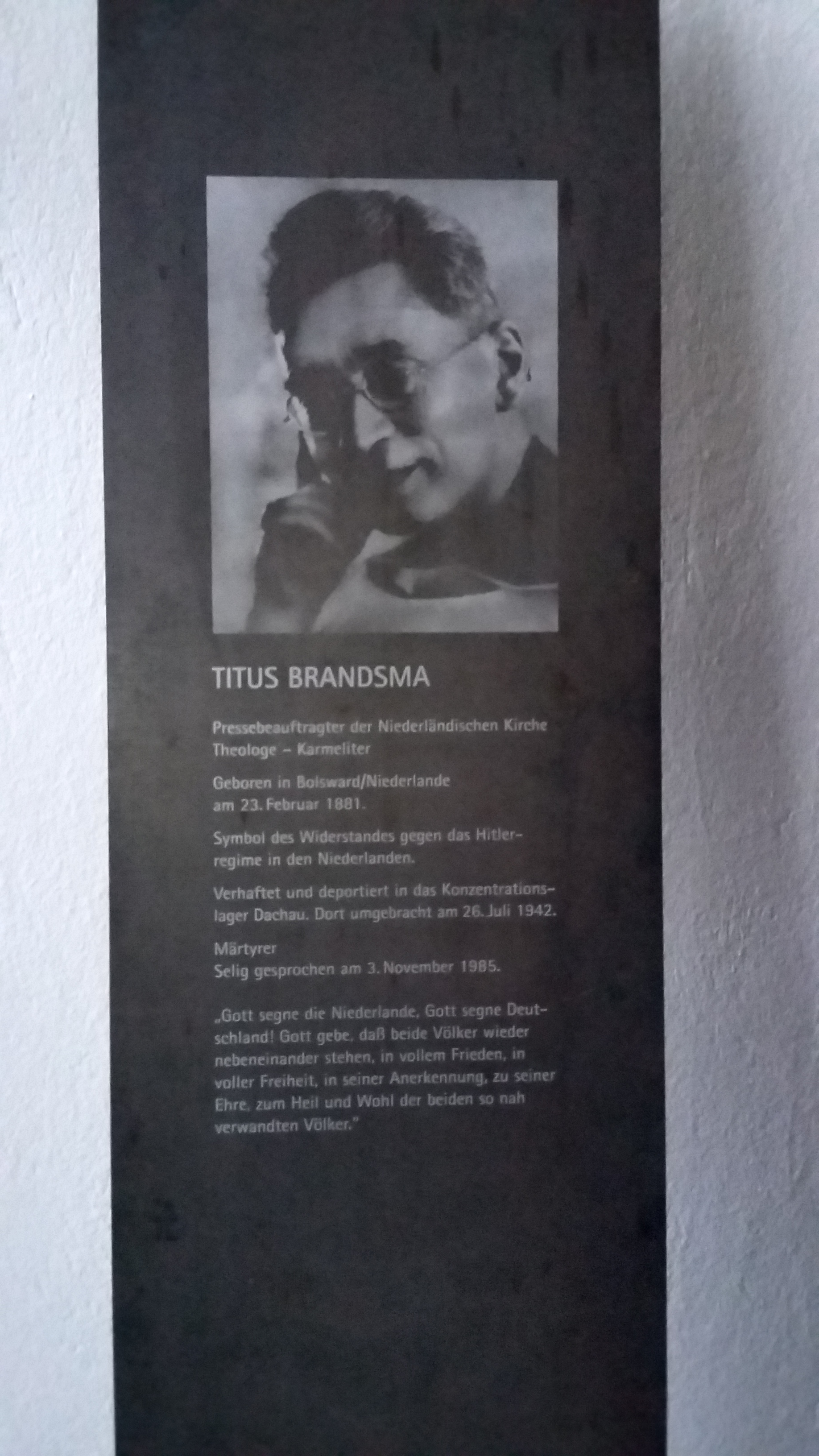 Titus Brandsma, tablica pamiątkowa, znajdująca się w kościele Karmelitów w Duisburgu, w Niemczech.